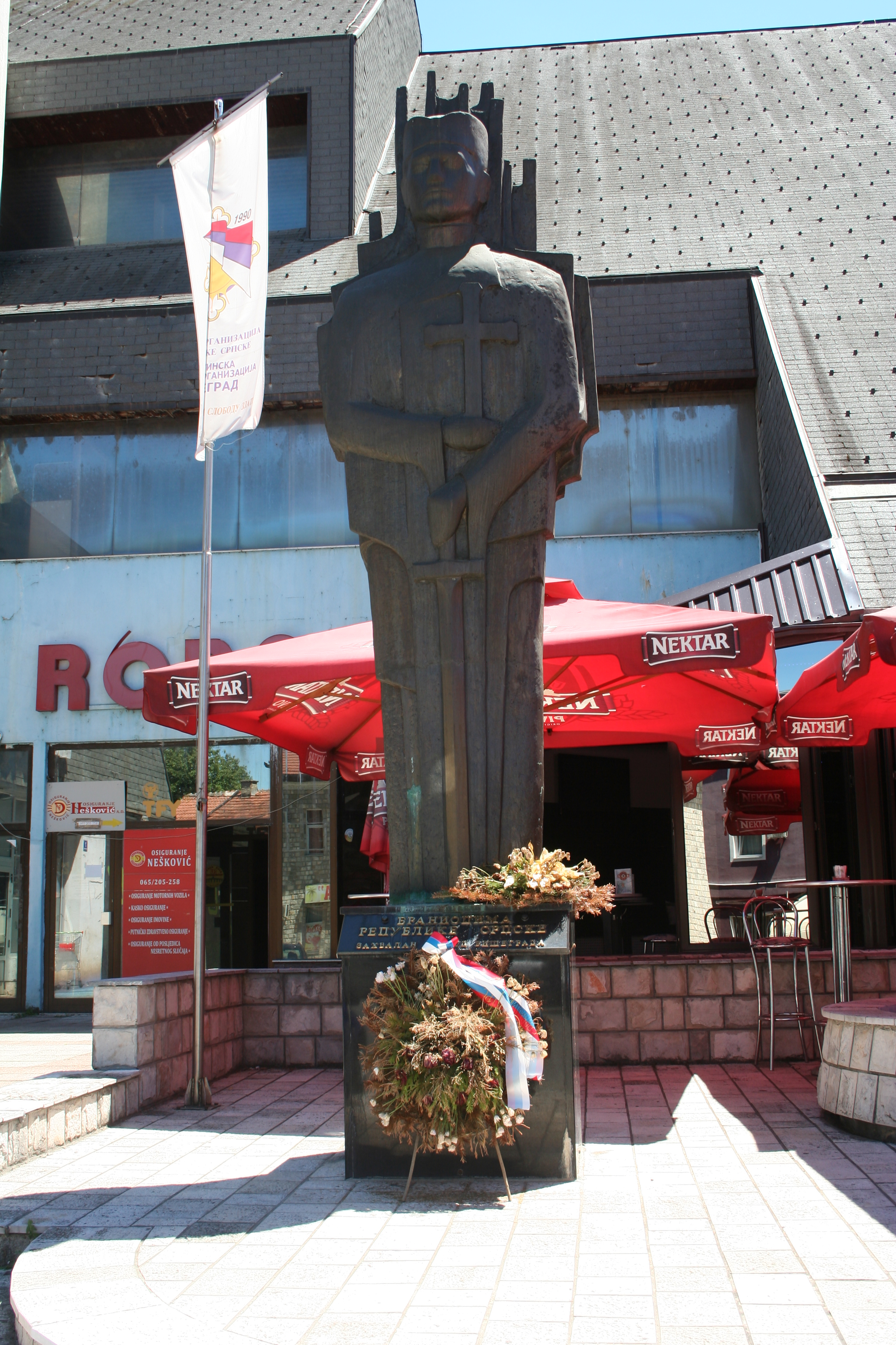 Višegrad